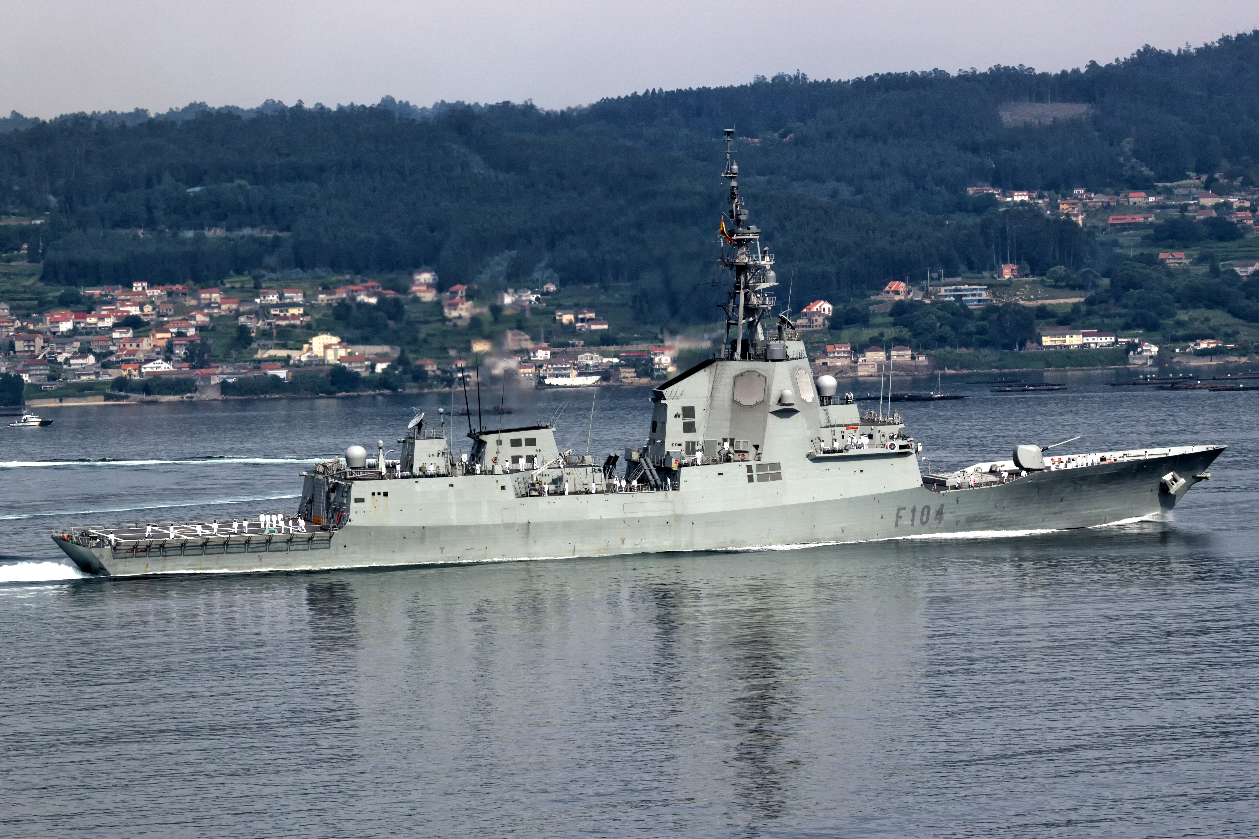 A fragata F104 Mendez Núñez participando na parada naval do 300 aniversario da Real Compañía de Guardamarinas na Escola Naval de Marín.